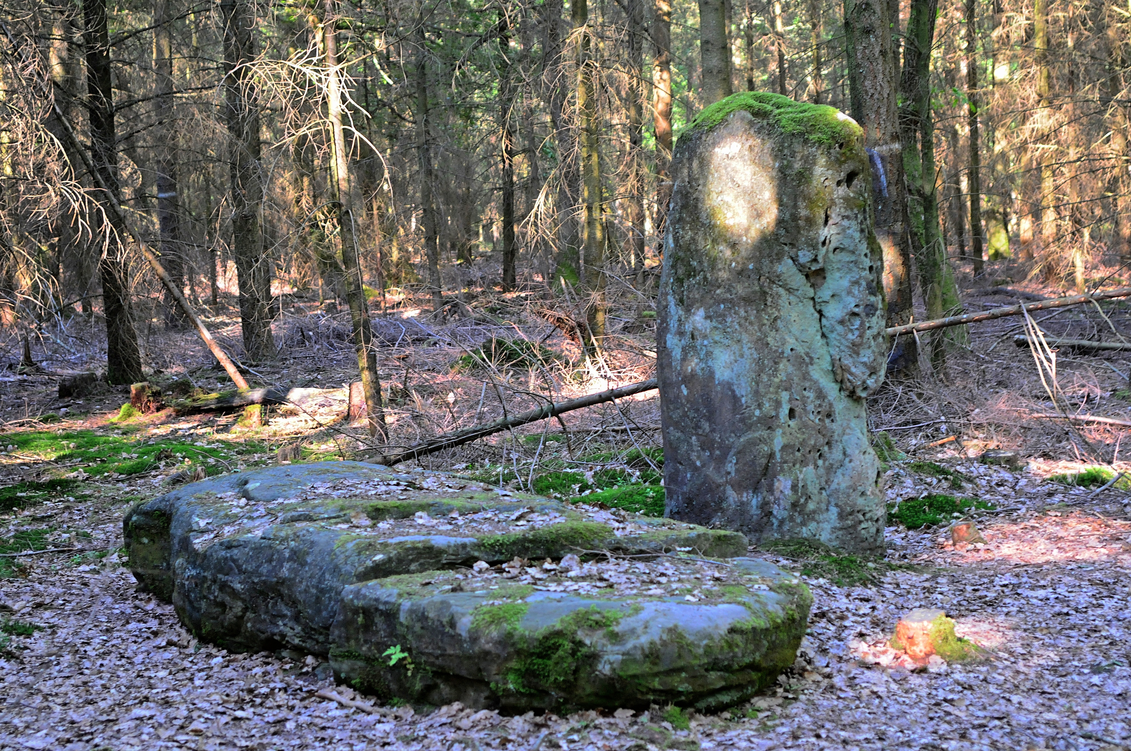 Nusbaumer Menhire aus Liassanstein. Nahe des höchsten Punktes des Ferschweiler Plateaus. Stehender Menhir 2,1 m hoch - Liegender Menhir 294 cm lang